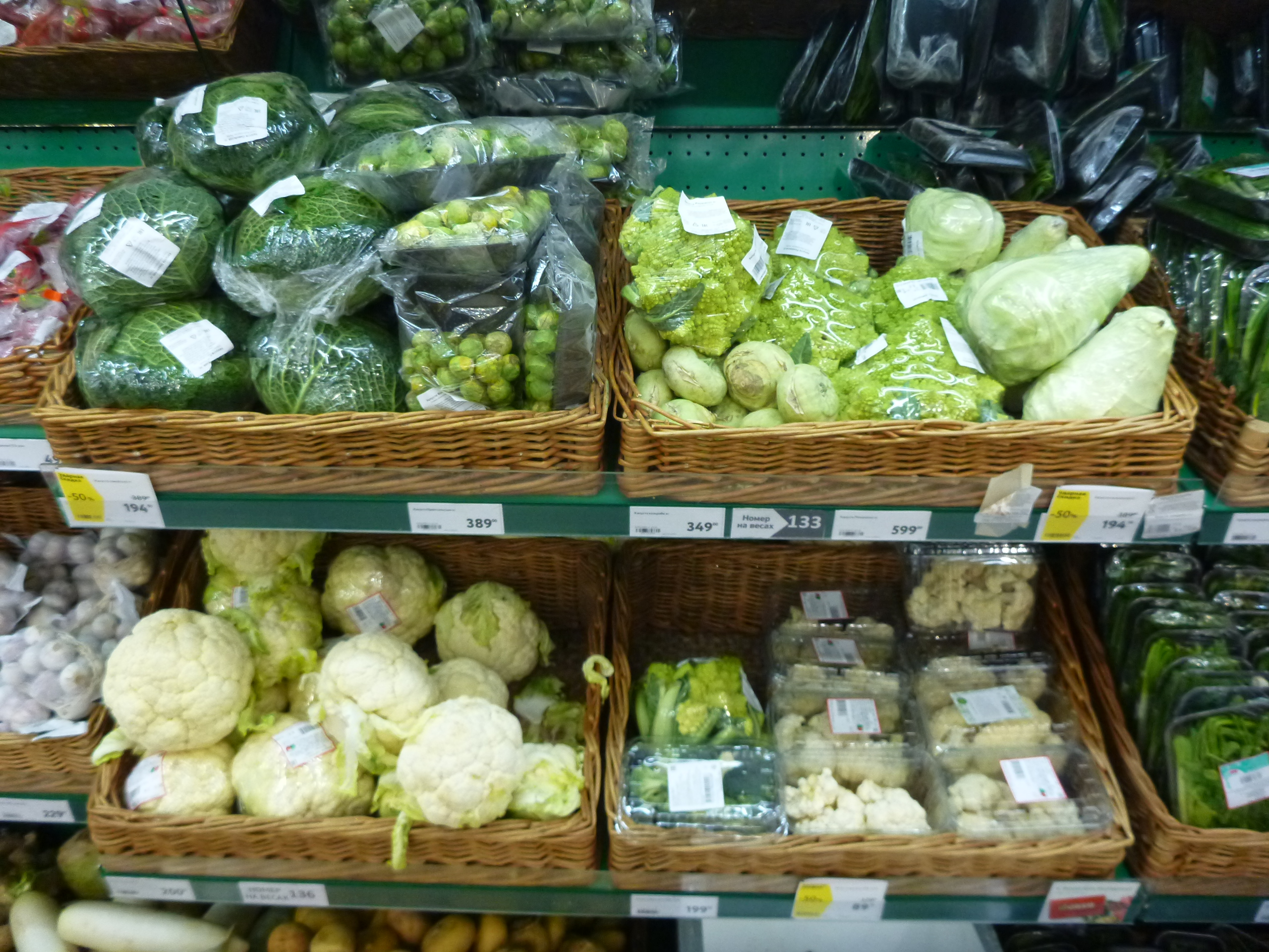 Разные сорта капусты в магазине Екатеринбурга 23 марта 2020 года